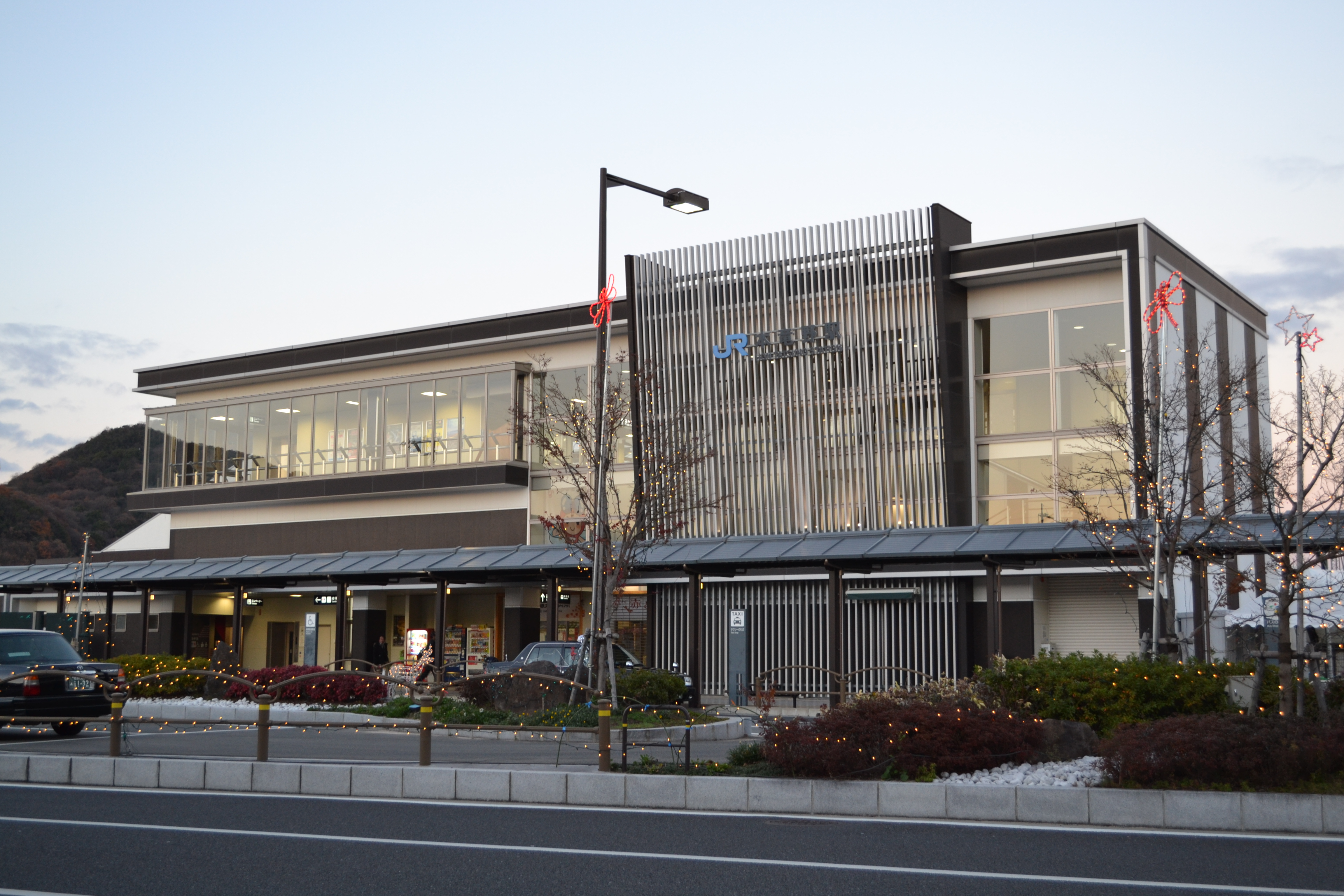 本竜野駅西口